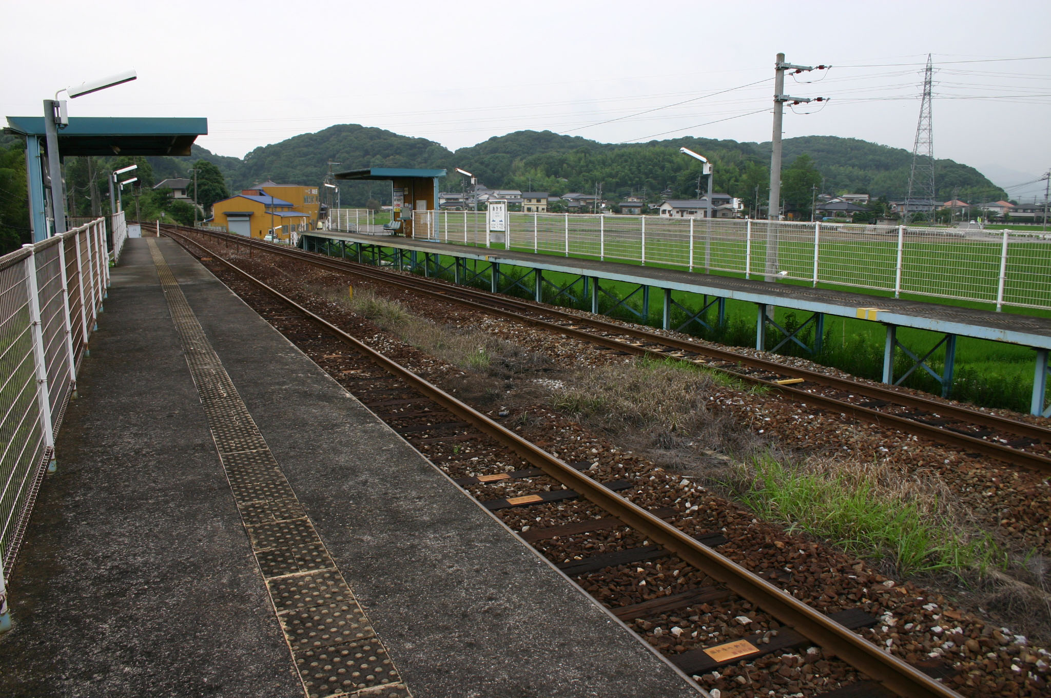 あかぢ駅構内